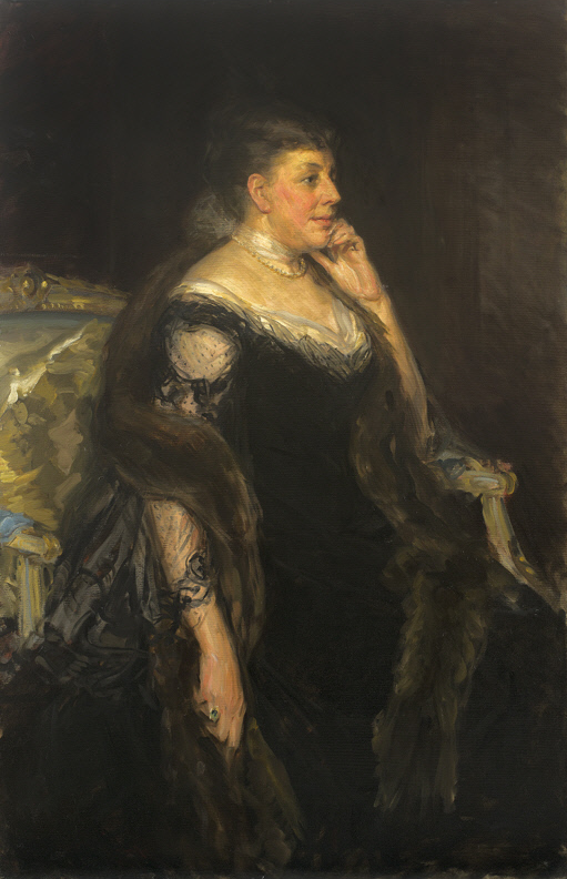 Mrs. Henry Isaac Barbey-Lorillard